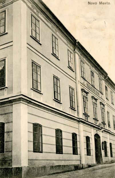 Narodni dom v Novem mestu je bil prizorišče literarnega večera, na katerem sta nastopila Miran Jarc in Anton Podbevšek. Razglednico hrani Knjižnica Mirana Jarca Novo mesto.